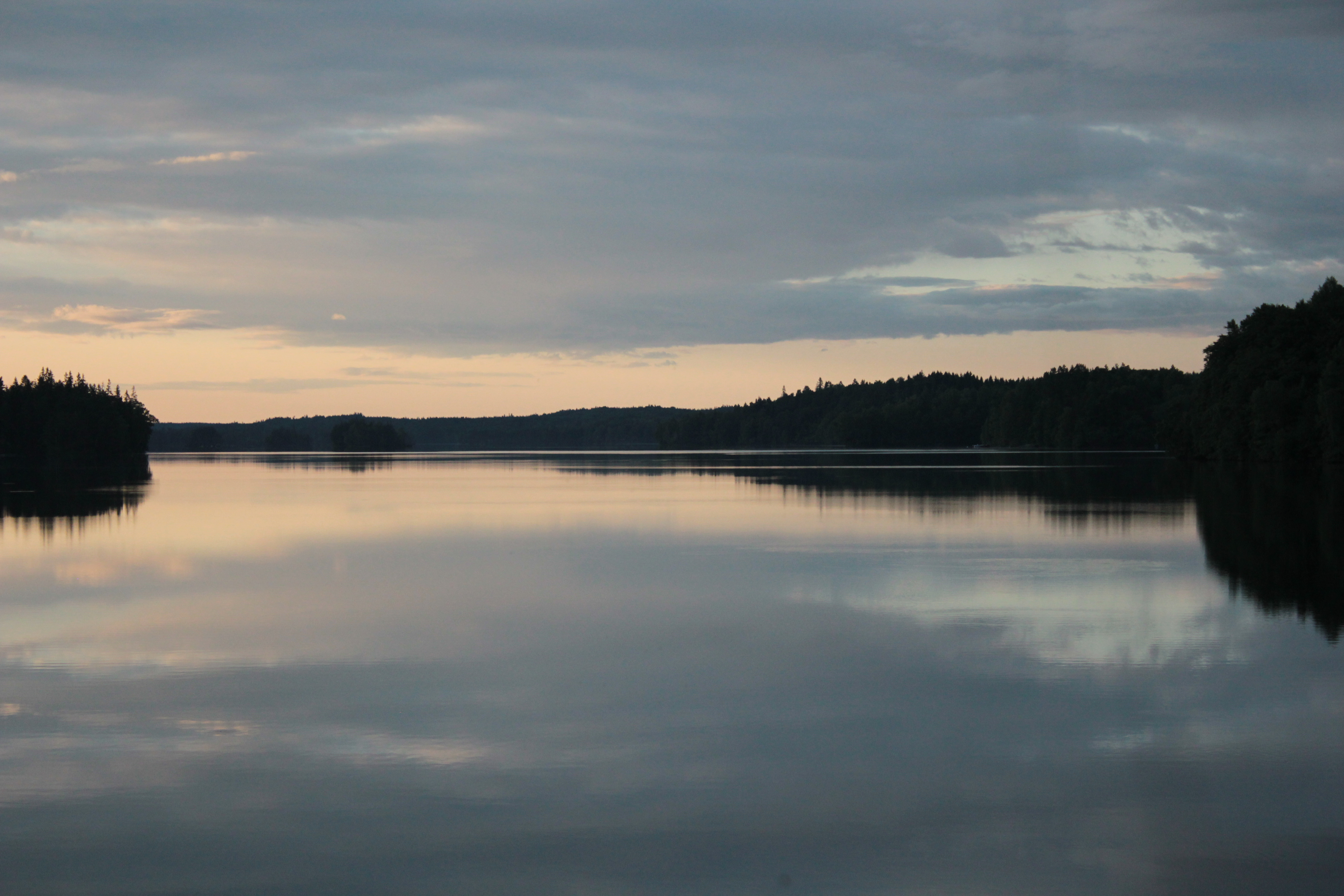 Hindsen sø i Sverige ved aftenstid.